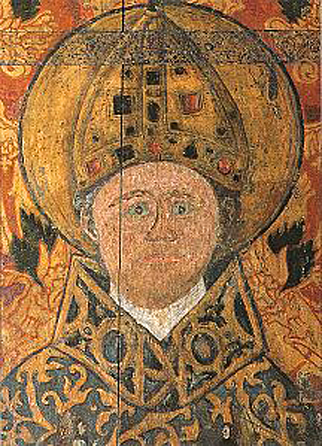 Portrait de Mayeul de Cluny sur l'armoire à reliques de Souvigny XVe siècle